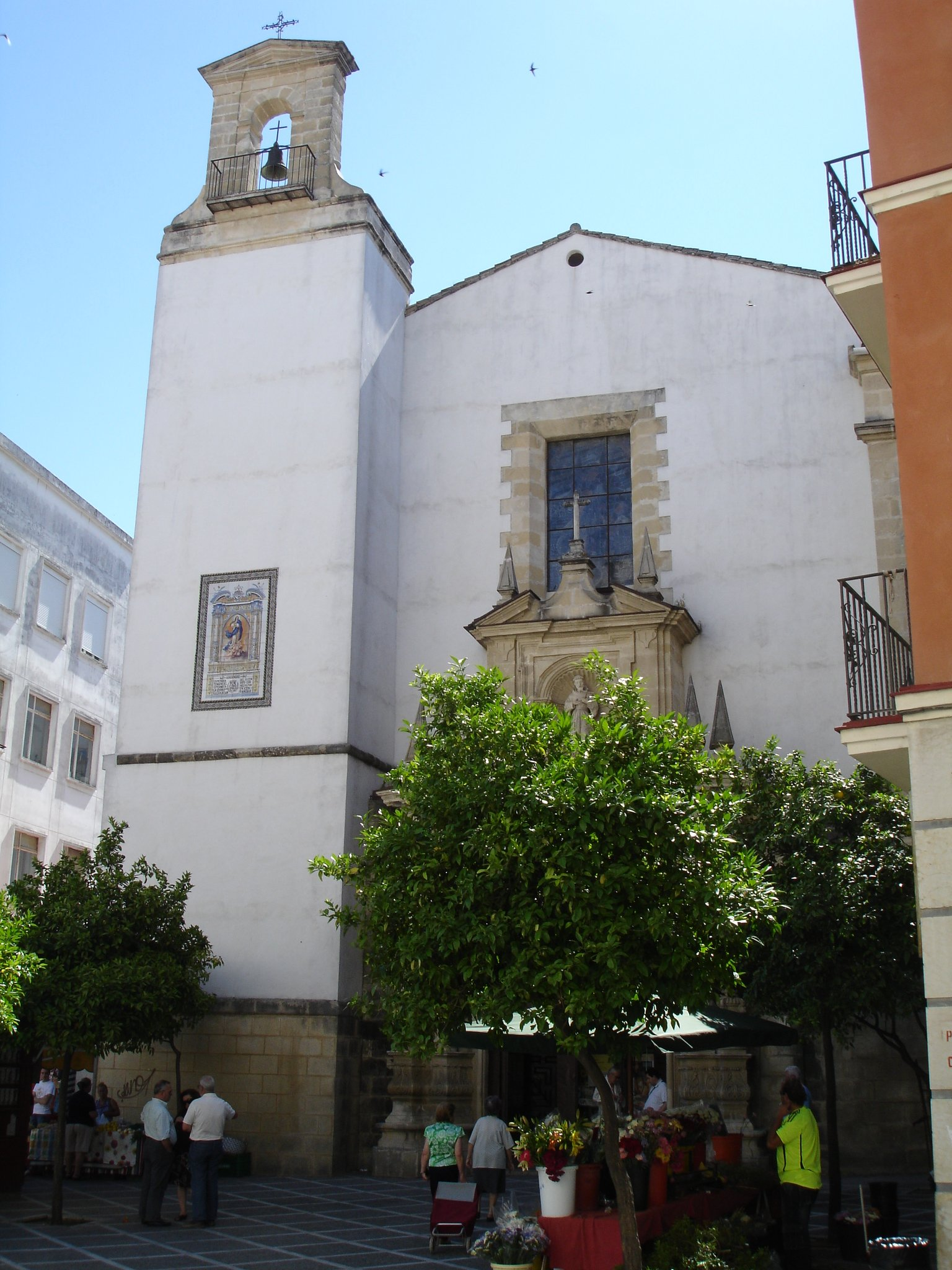 Iglesia de San Francisco, Jerez (Andalusia, SPAIN)